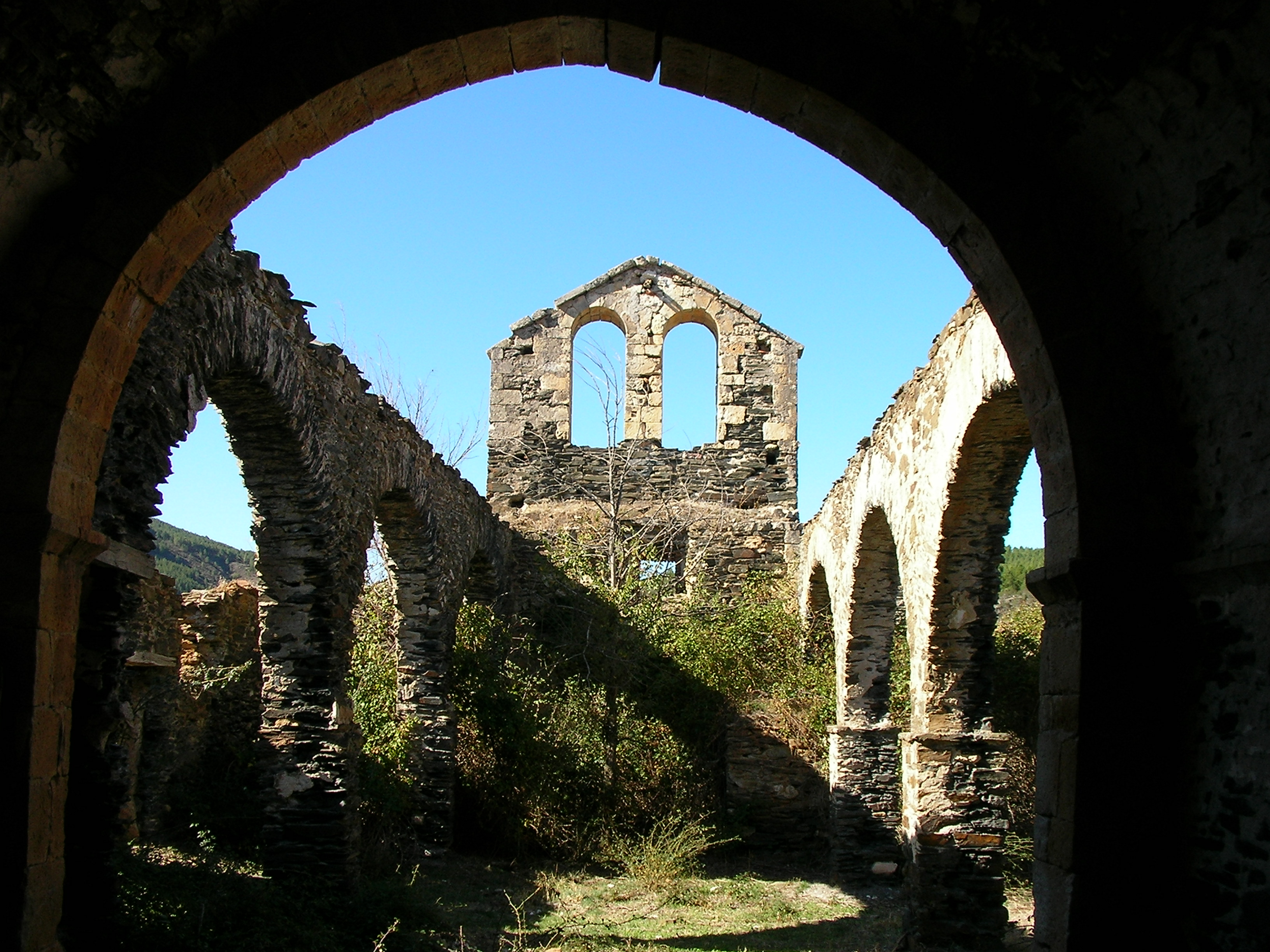 INTERIOR DE LA IGLESIA DE NUESTRA SEÑORA DE LA BLANCA, EL VADO (GUADALAJARA)